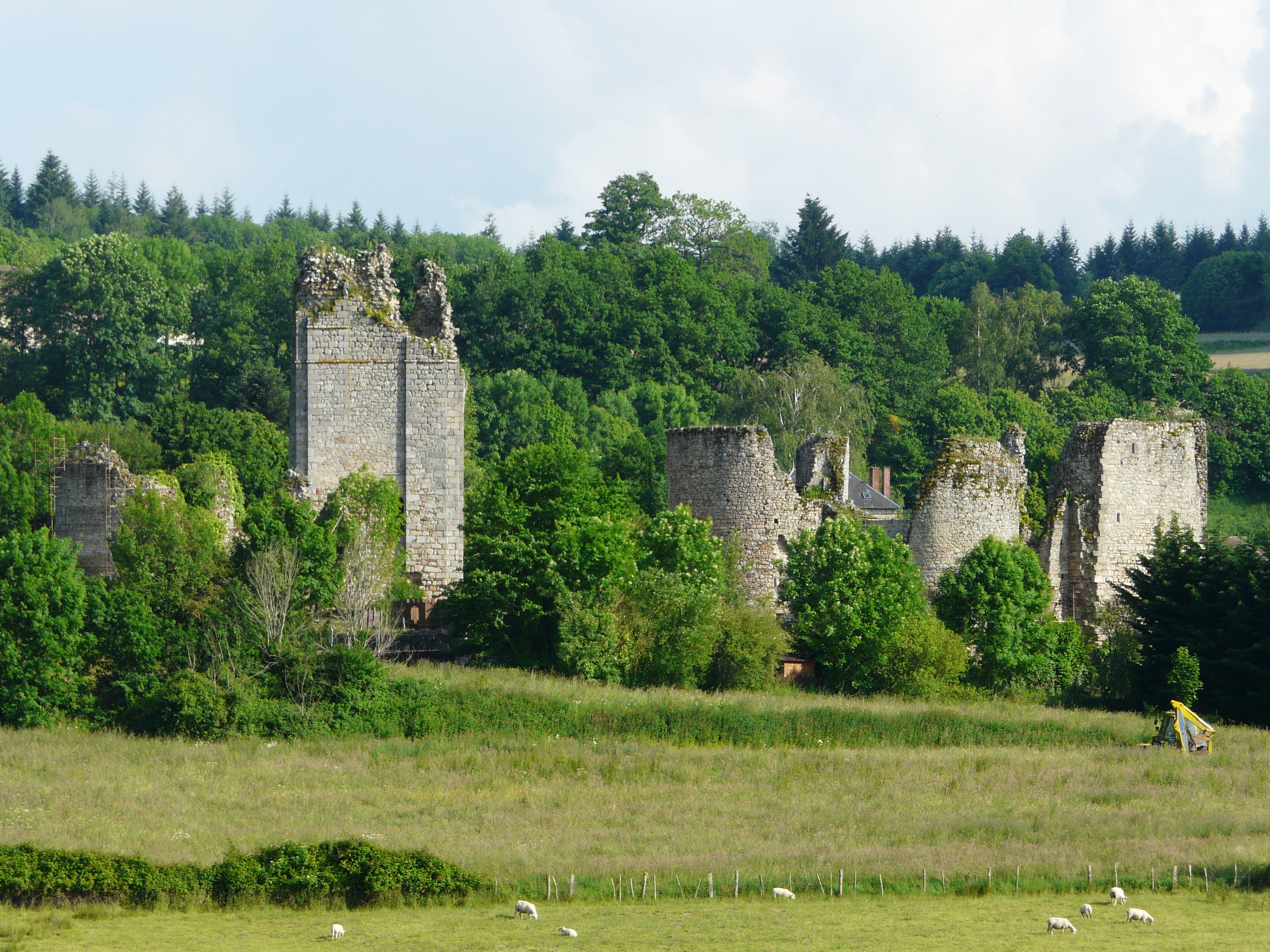 Le château de Lastours, Rilhac, Lastours, Haute-Vienne, France.